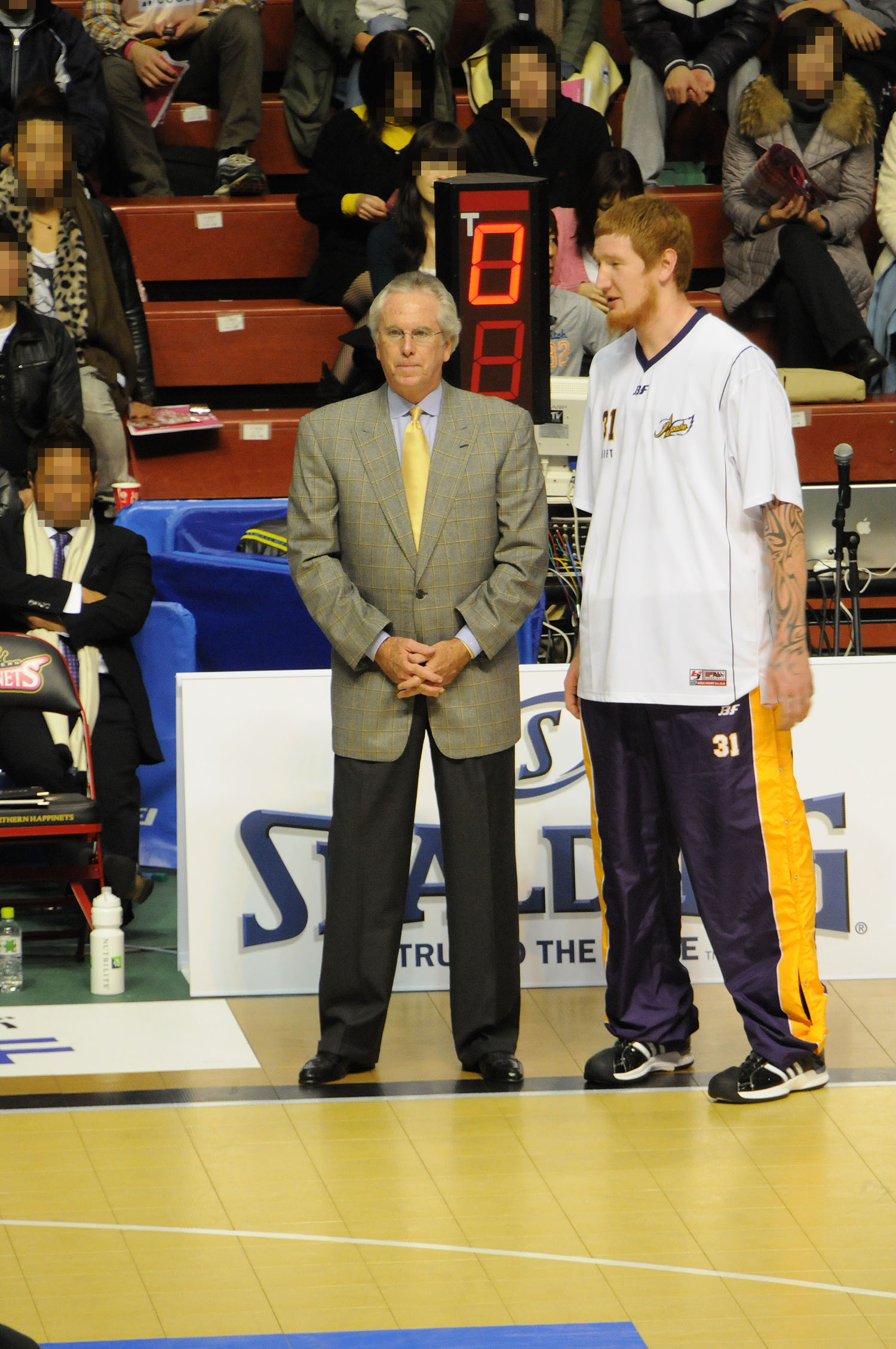 東京アパッチ、ボブ・ヒルヘッドコーチ。秋田市立体育館で。